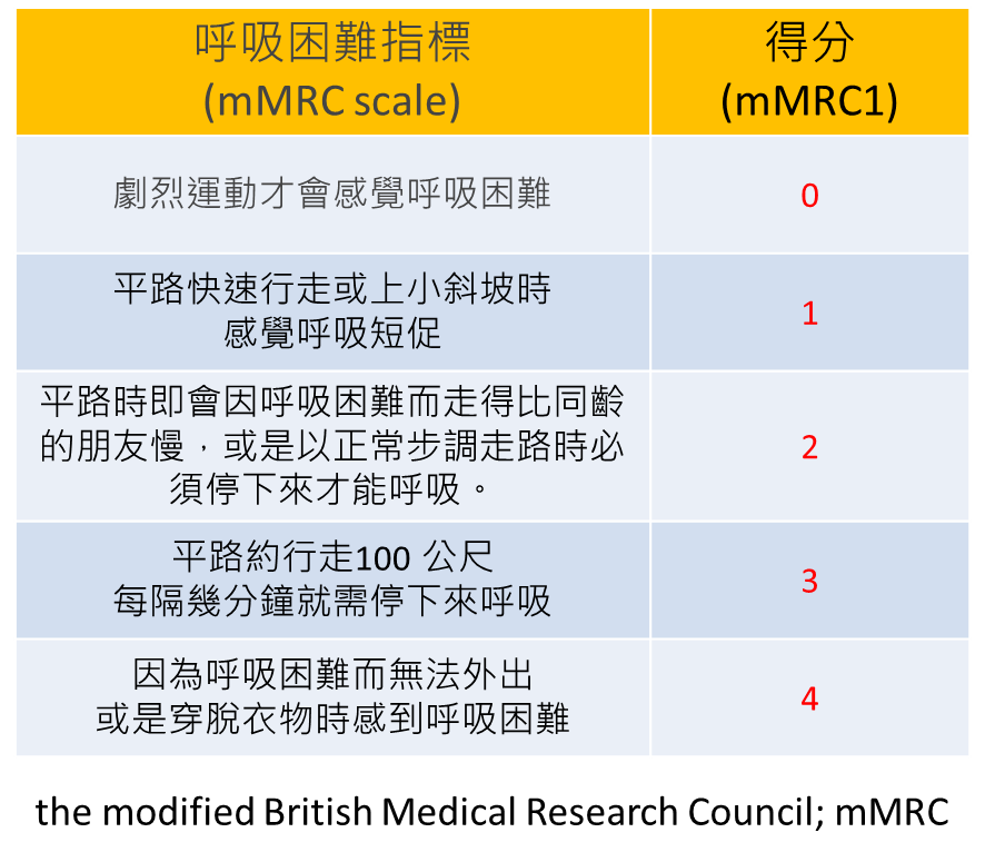 mMRC scale 呼吸困難指標；根據國外國際治療準則、期刊文獻內容，翻譯成中文後重新製圖。